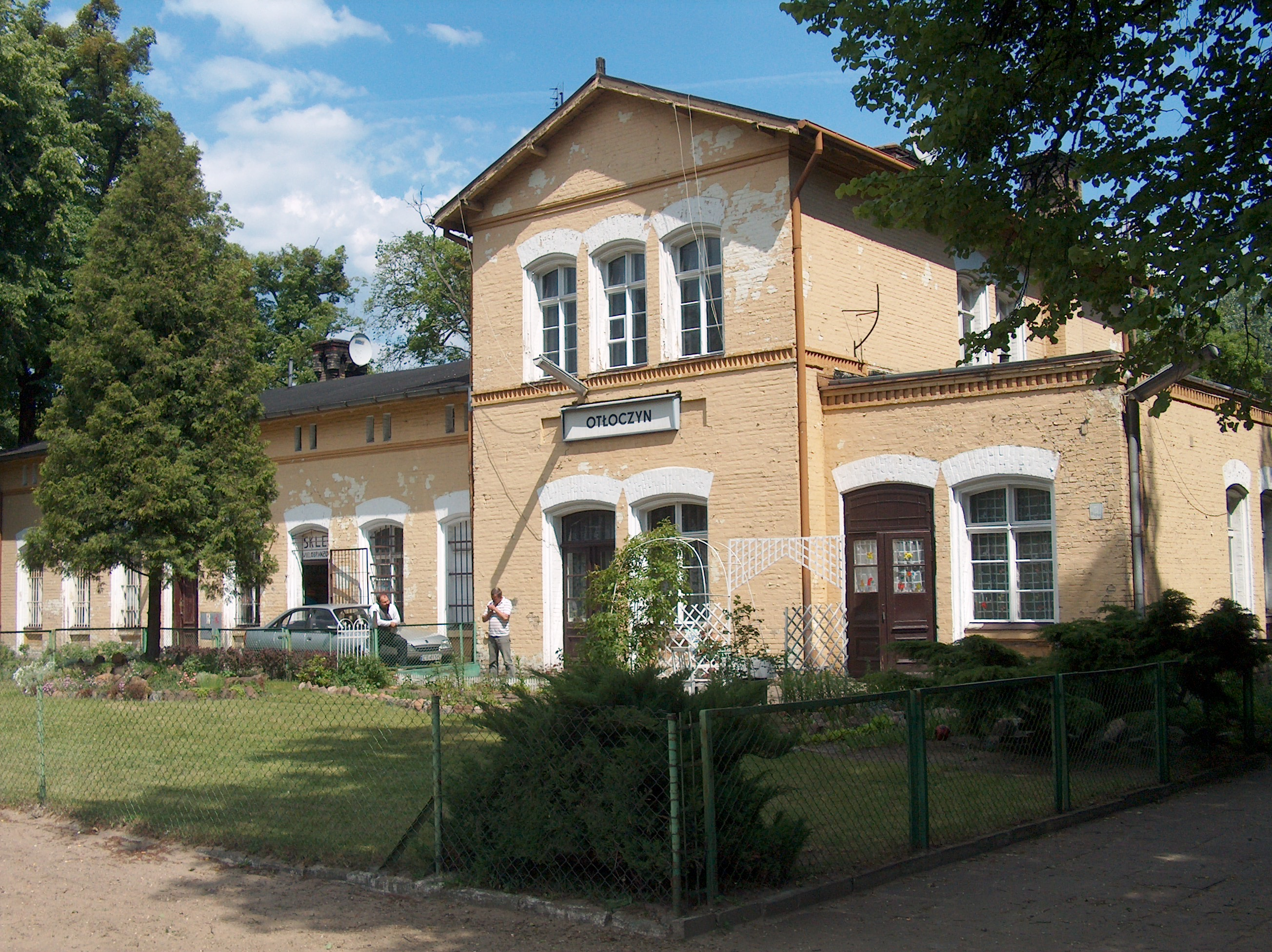 Otłoczyn (stacja kolejowa)